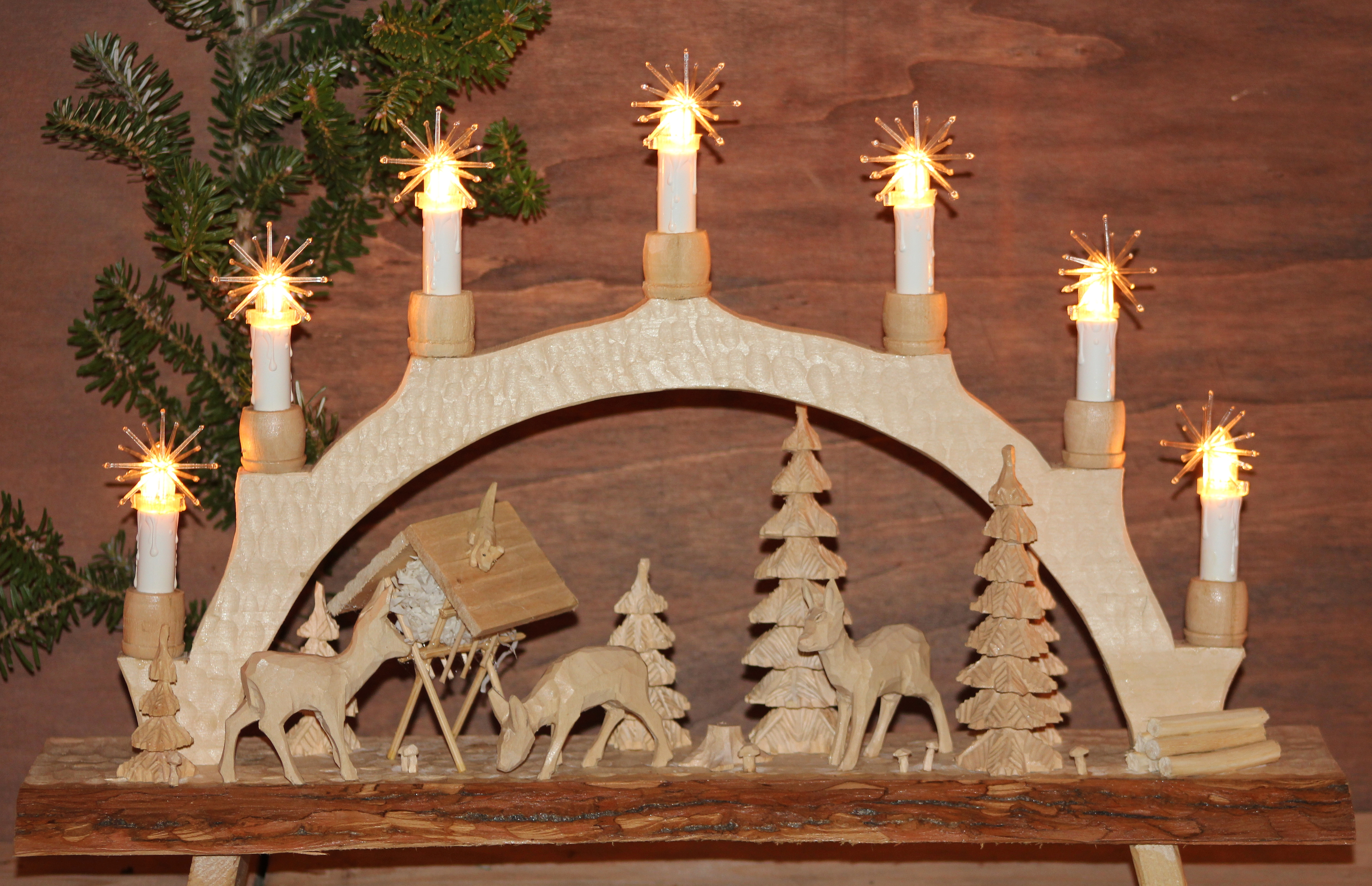 Schwibbogen. Aufgenommen in Stollberg, St.Jakobi Kirche- die Größte Schwibbogenausstellung der Region. Erzgebirgskreis. Sachsen.